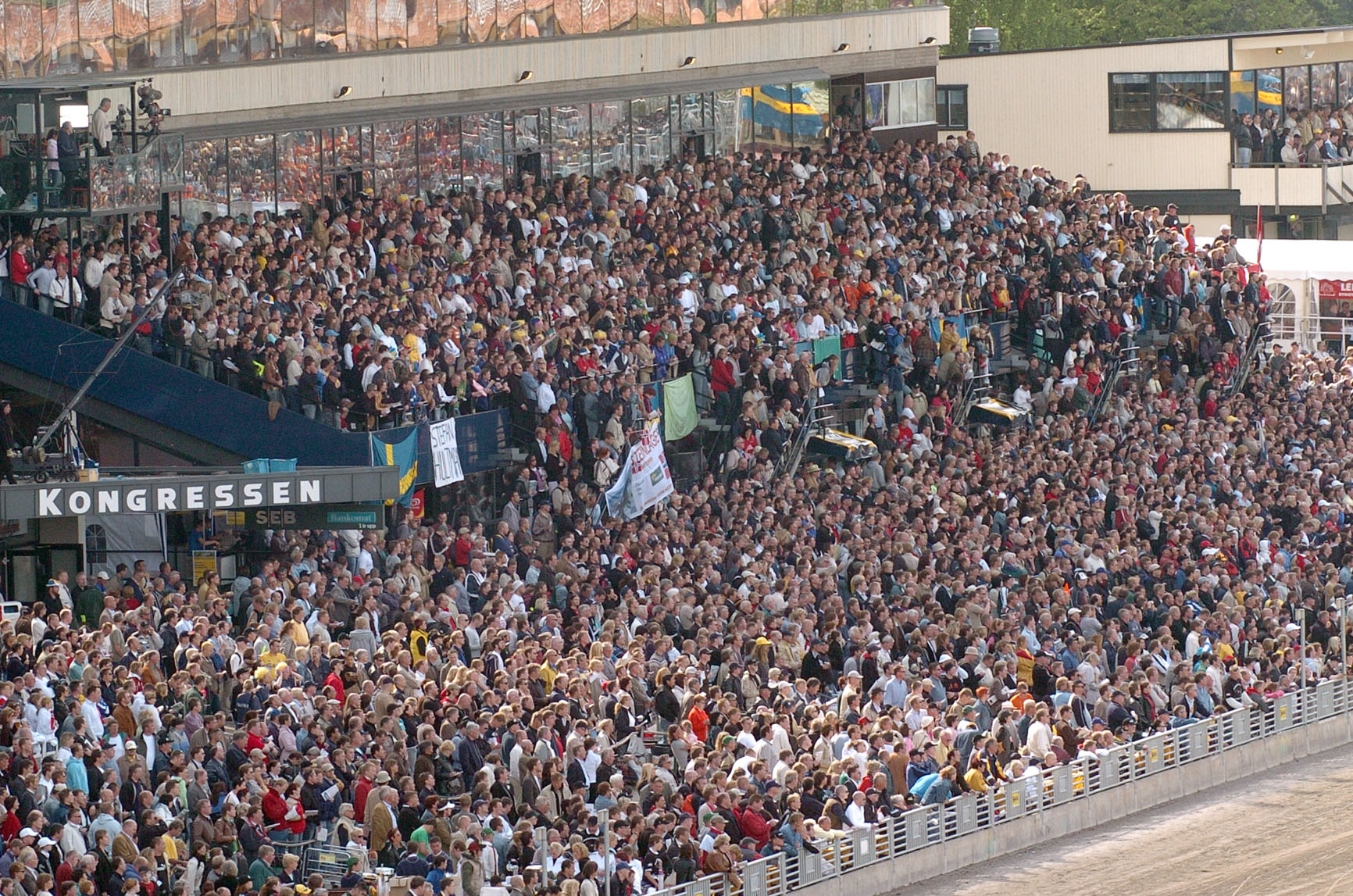 E-läktaren på Solvalla under Elitloppet 2005.